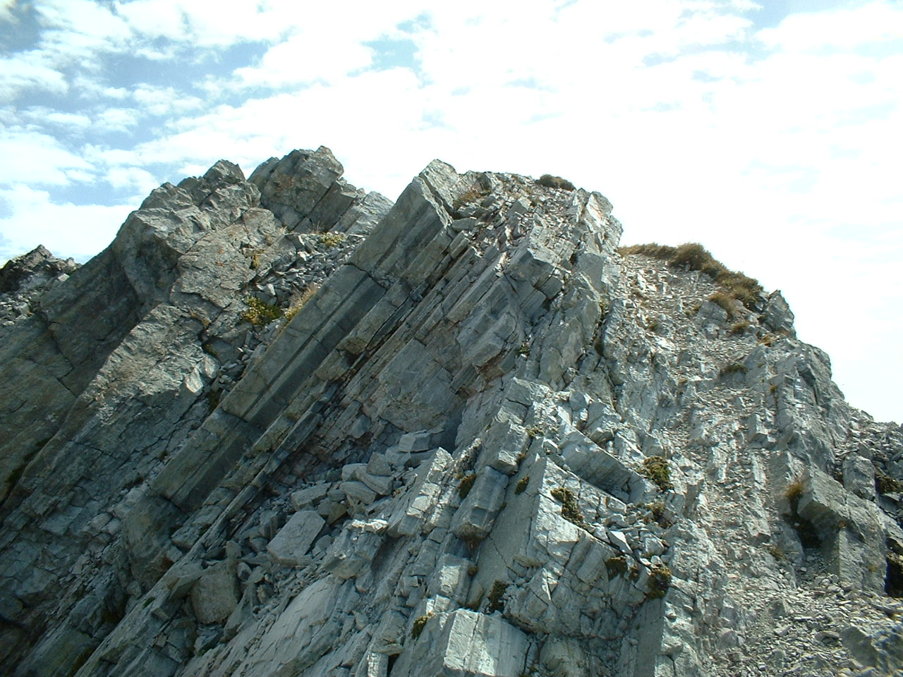 Sono l'autore della foto. Autore: Logudro. Data: 27/08/07.